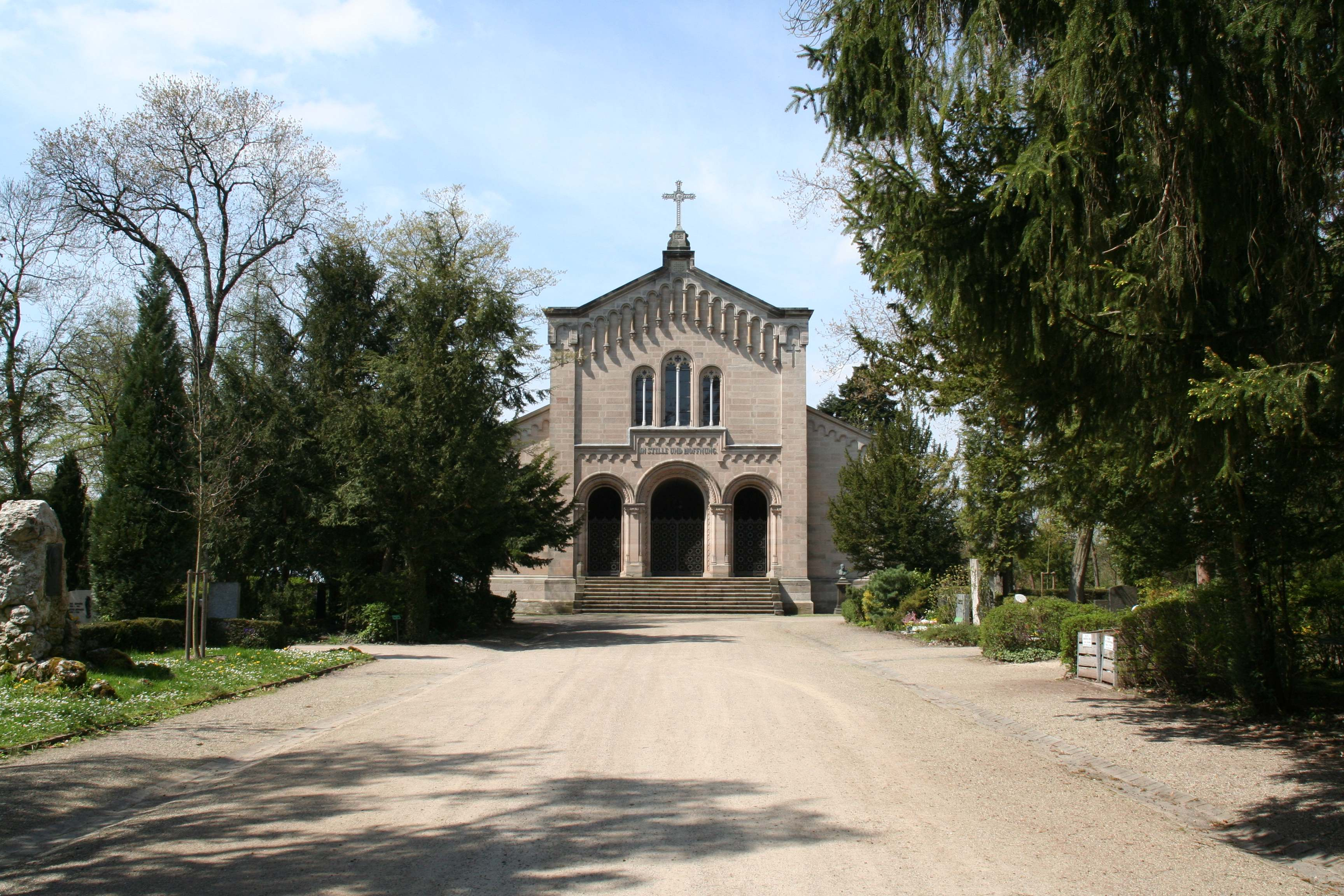 Herzogl. Mausoleum, Friedhof am Glockenberg, Coburg